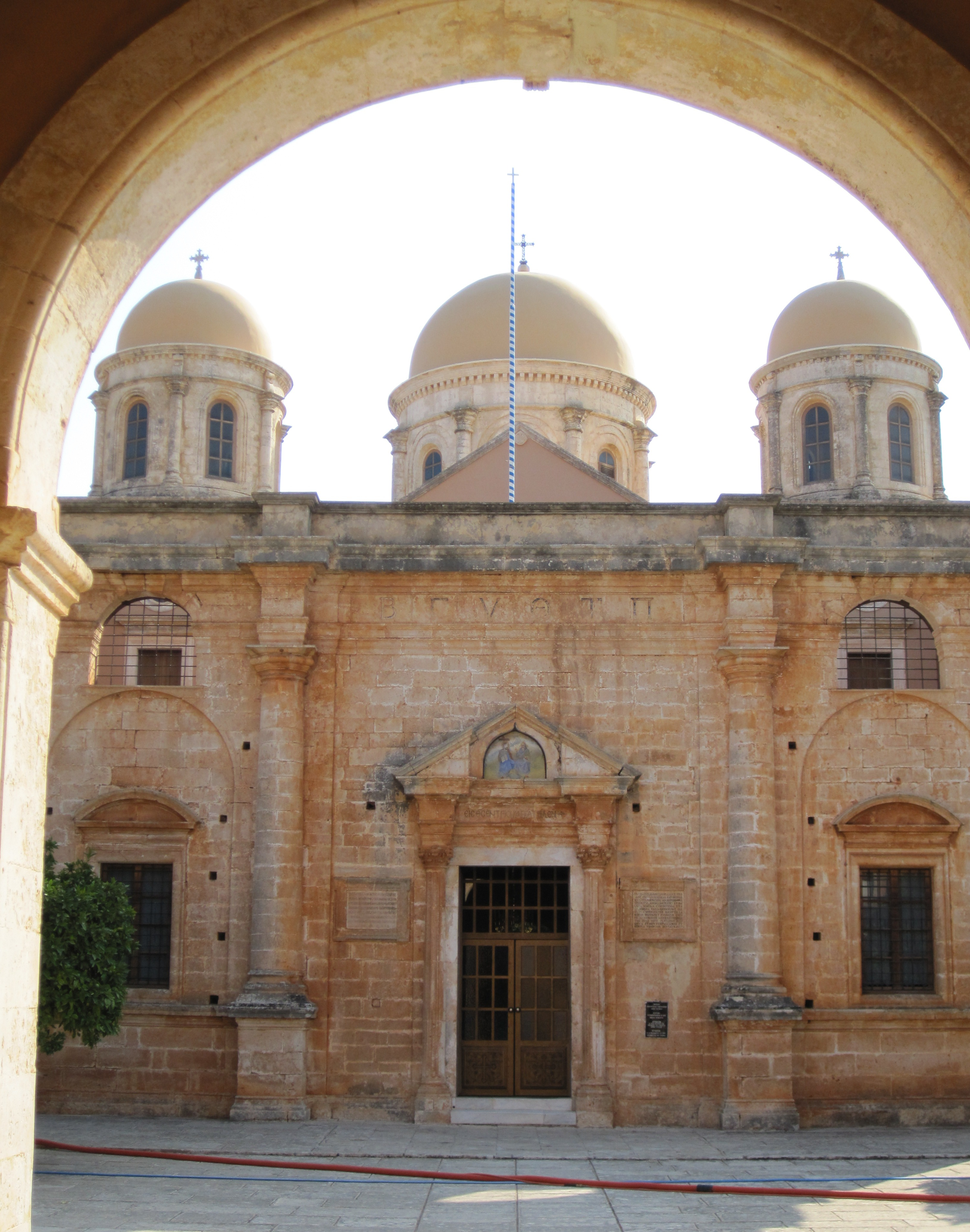 Kloster Agia Triada auf Kreta/Akrotiri